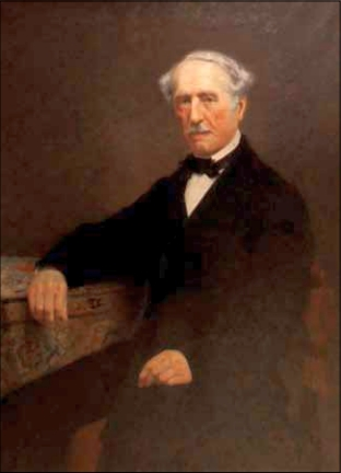 „Portretul lui Christian Mieß” - fotografie alb-negru, ulei/pânză, 109 x 83,3 cm, semnat dreapta jos, cu brun: Mieß, datat: (18)96, colecția Muzeului Brukenthal, nr. inv. 1492